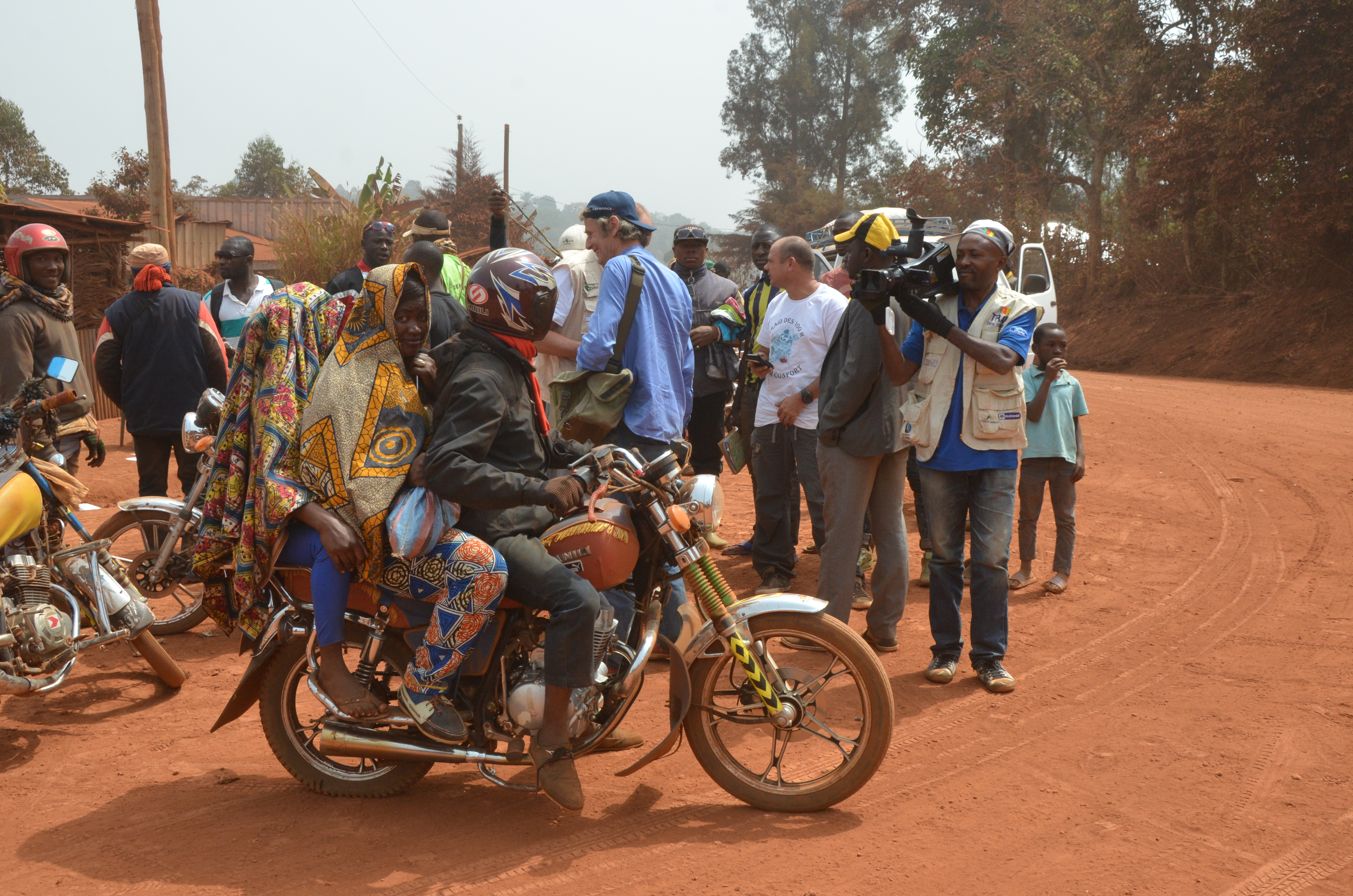 Moto taxi transportant ses passagers à Mbouda, à l'Ouest du Cameroun This is an image with the theme "Africa on the Move or Transport" from: Cameroon